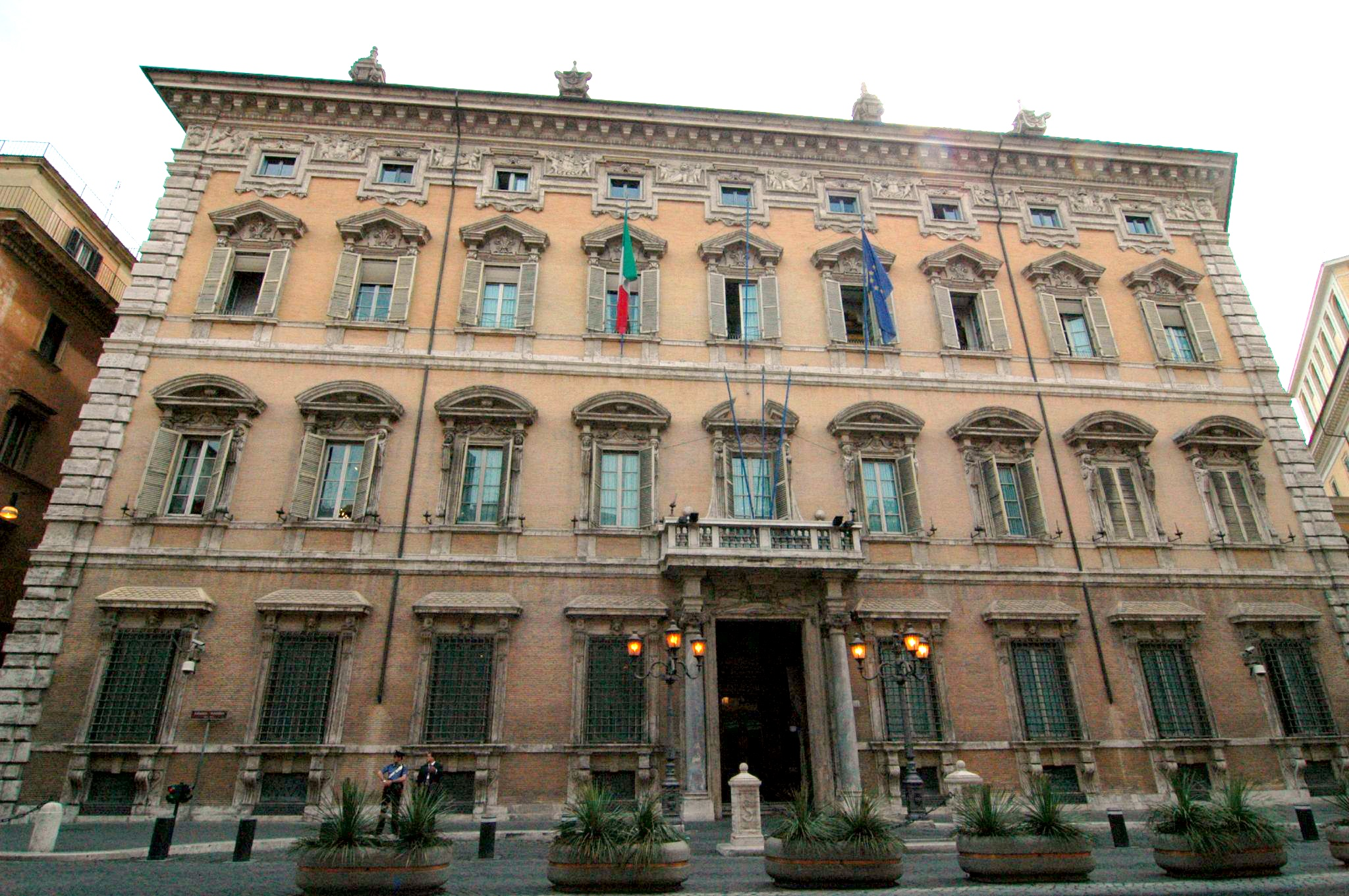 Palazzo Madama, Rome, ItalyPalazzo Madama (Senato)